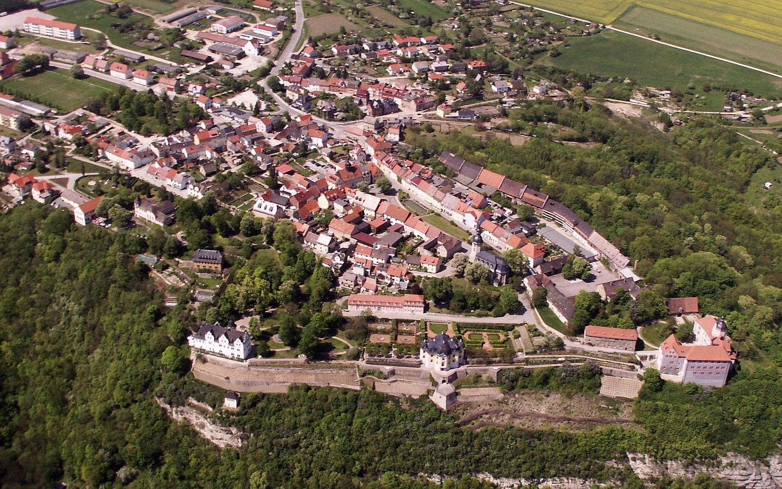 Dornburg Saale Luftbild Stadtzentrum und Dornburger Schlösser Renaissanceschloss Rokokoschloss St Jacobi-Kirche Altes Schloss Foto 2008 Wolfgang Pehlemann Wiesbaden PICT0284.jpg